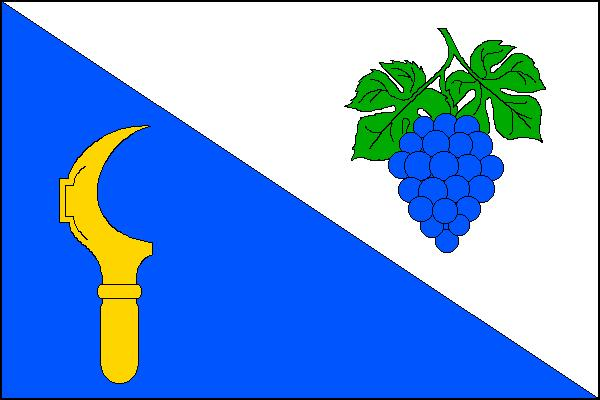 Vlajka obce Bratčice